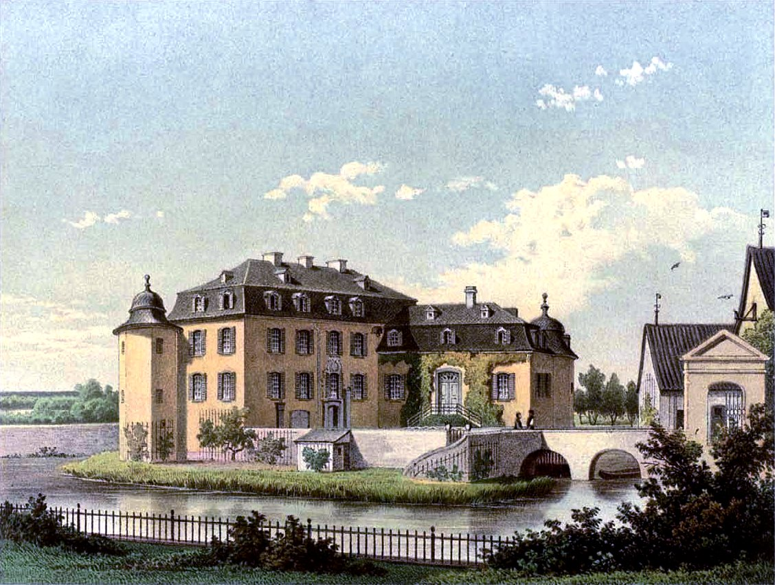 Schloss Lüftelberg, Lithografie aus dem 19. Jahrhundert